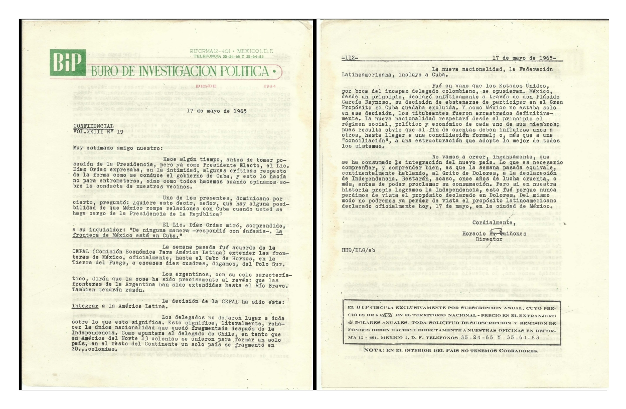 Ejemplar regular del Buró de investigación política (Vol. XXIII Núm. 19, mayo 17, 1965)